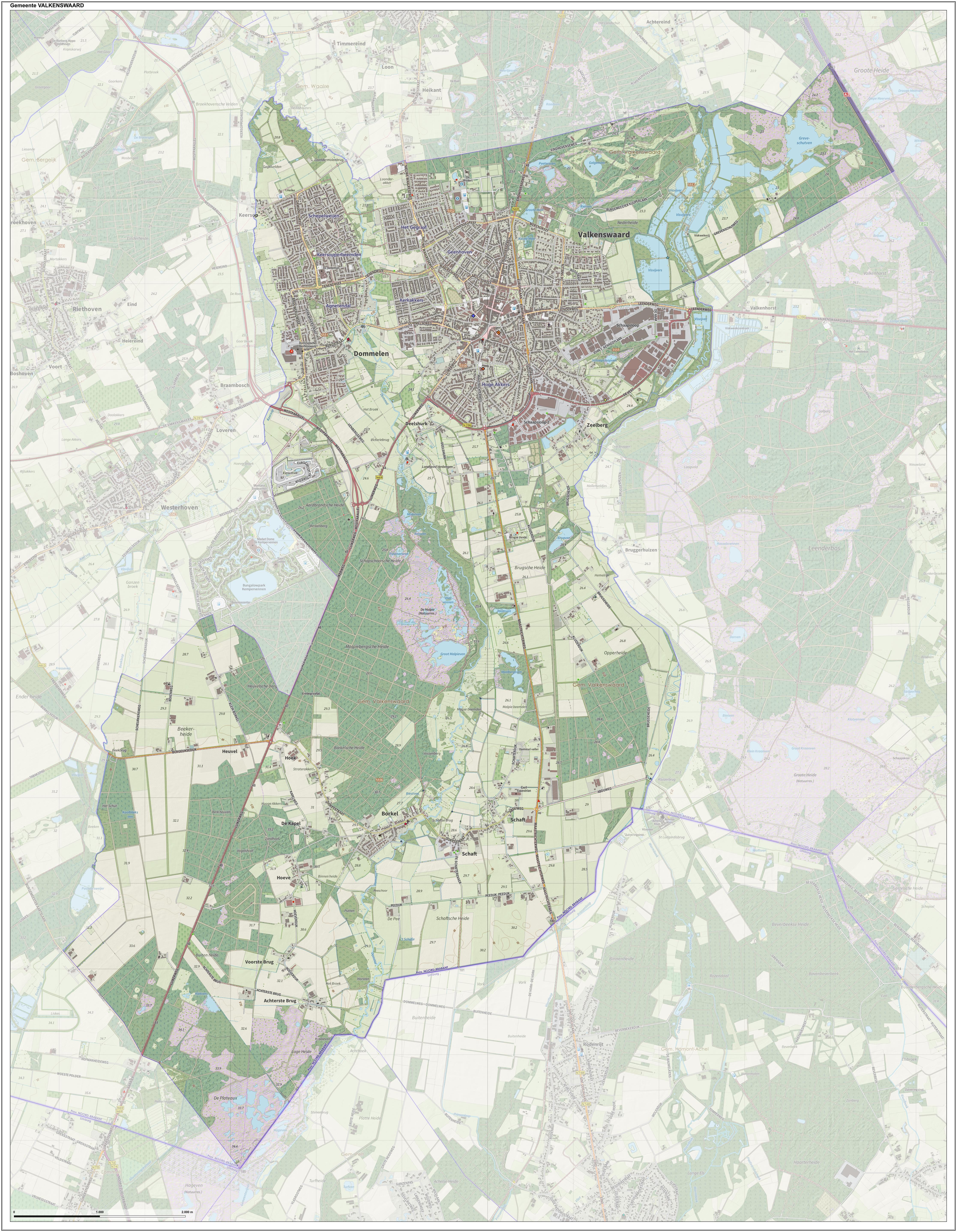 Topografische gemeentekaart. Resolutie: 400 pixels/km. Kaartbeeld samengesteld uit de open geodata van de Top10NL en Top25namen (Kadaster), Creative Commons-BY licentie. Gebouwvlakken uit open geodata BAG extract. Wegen uit de OpenStreetMap, OpenStreetMap community. Reliëfschaduw uit de Actuele Hoogtekaart AHN2. Samenstelling en kleurenschema: Jan-Willem van Aalst, met QGIS. Zie ook de Legenda.